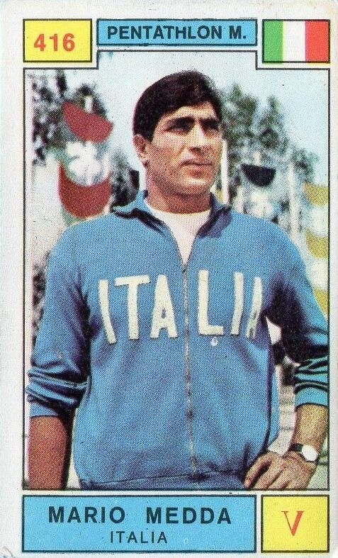 Figurina CAMPIONI dello SPORT 1969/70-n.416- MEDDA - ITALIA -PENTATHLON-Rec